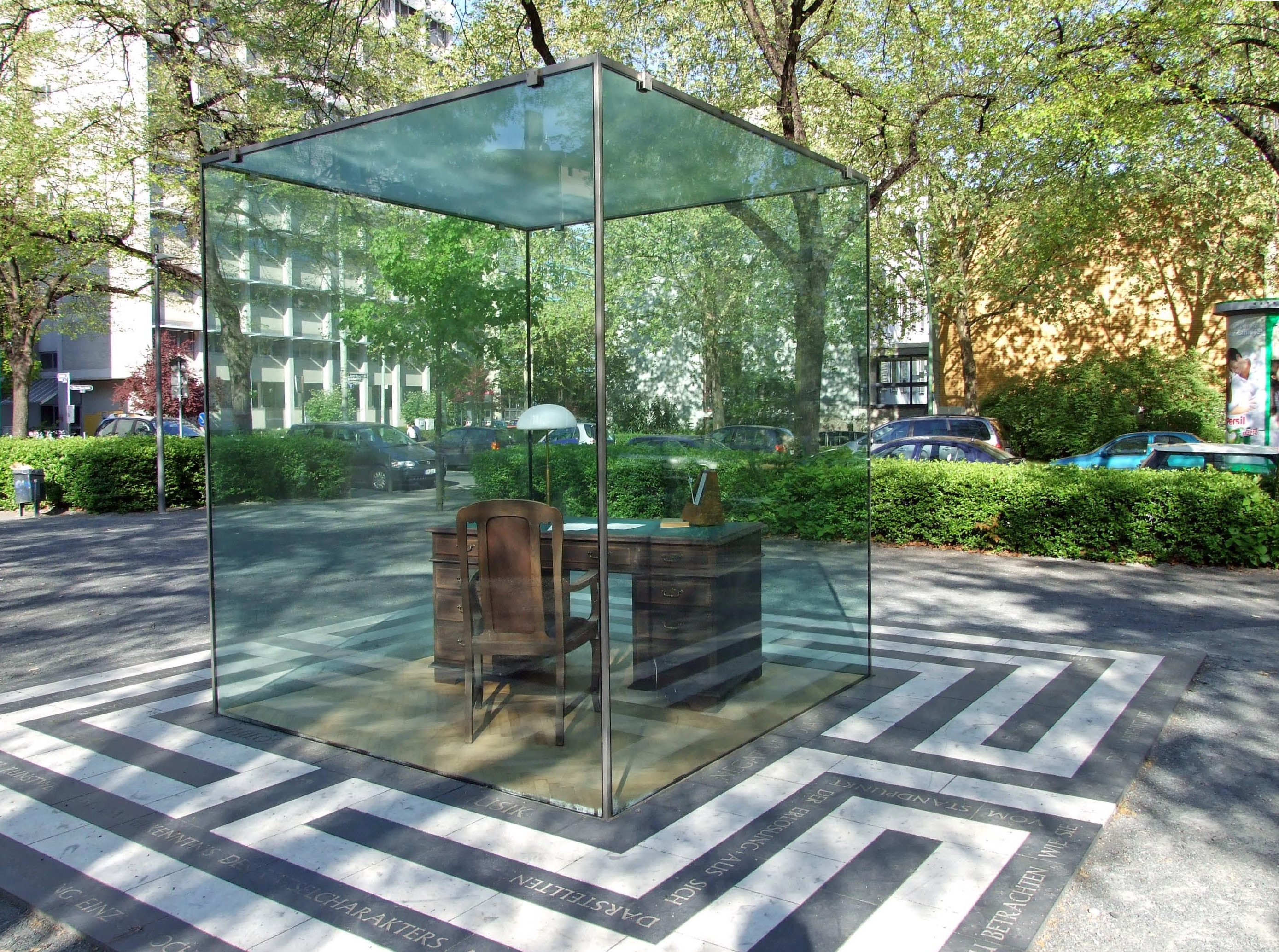 Das „Adorno-Denkmal“ auf dem „Theodor-W.-Adorno-Platz“ nur eine Parallelstraße (westlich) vom Institut für Sozialforschung entfernt.